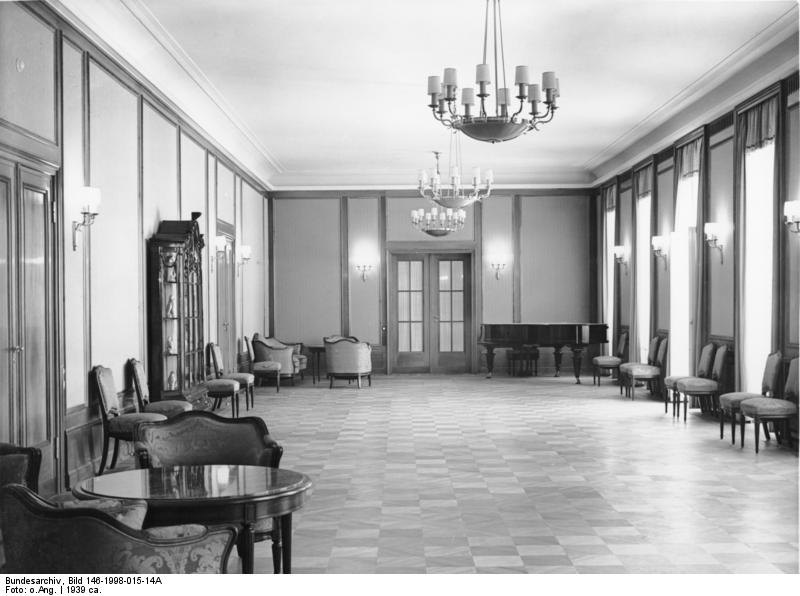 Berlin; Schloss Bellevue Musiksaal im Schloss Bellevue in Berlin, dem neuen Gästehaus des Reiches. ca. 1939